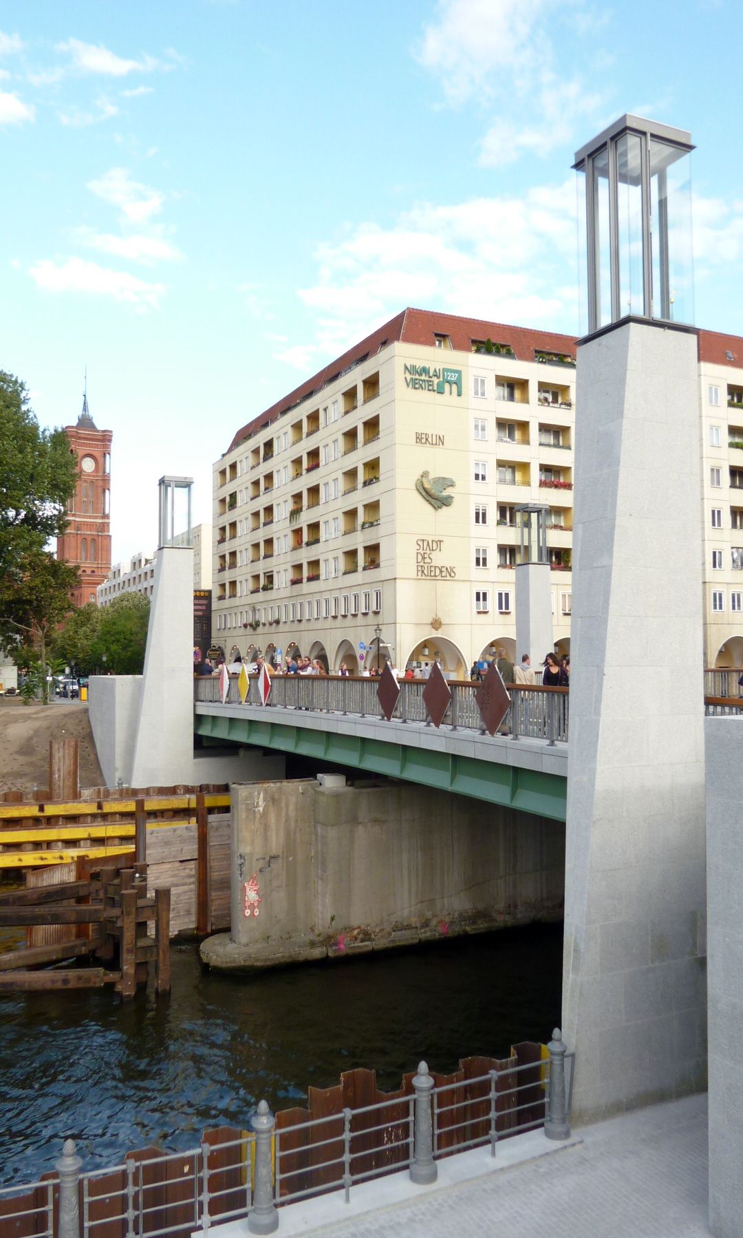 Die Rathausbrücke im September 2012